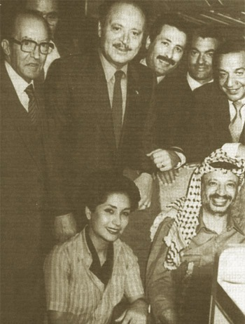 Mongi kooli avec Yasser Arafat dans l avion qui l a evacué de Beyrouth en 1982